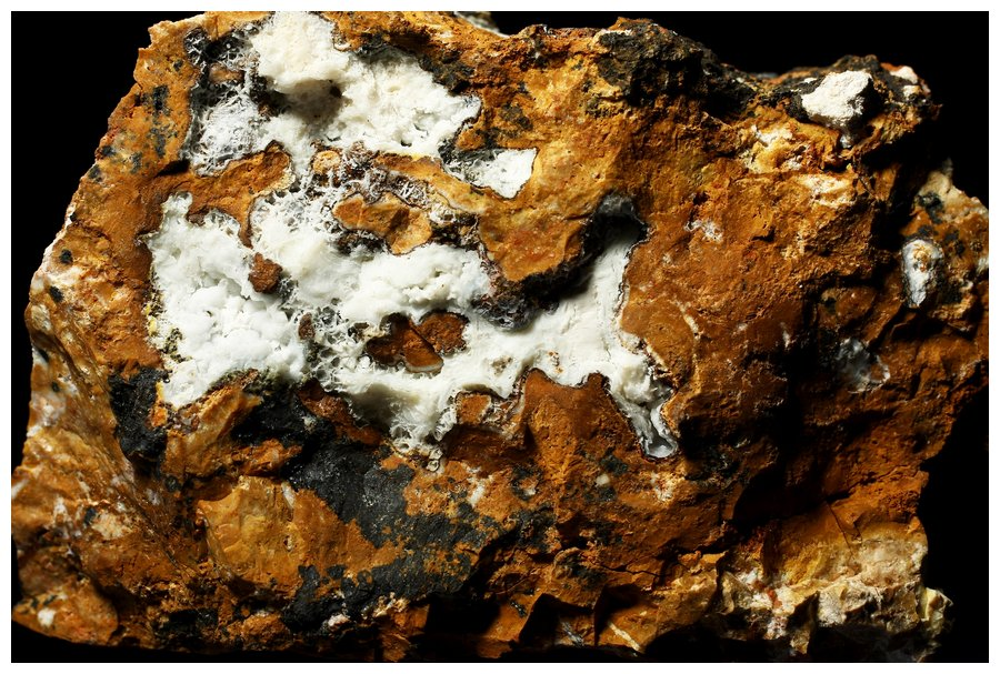 Mina de la Botalaria, Borriol, Castellón, España